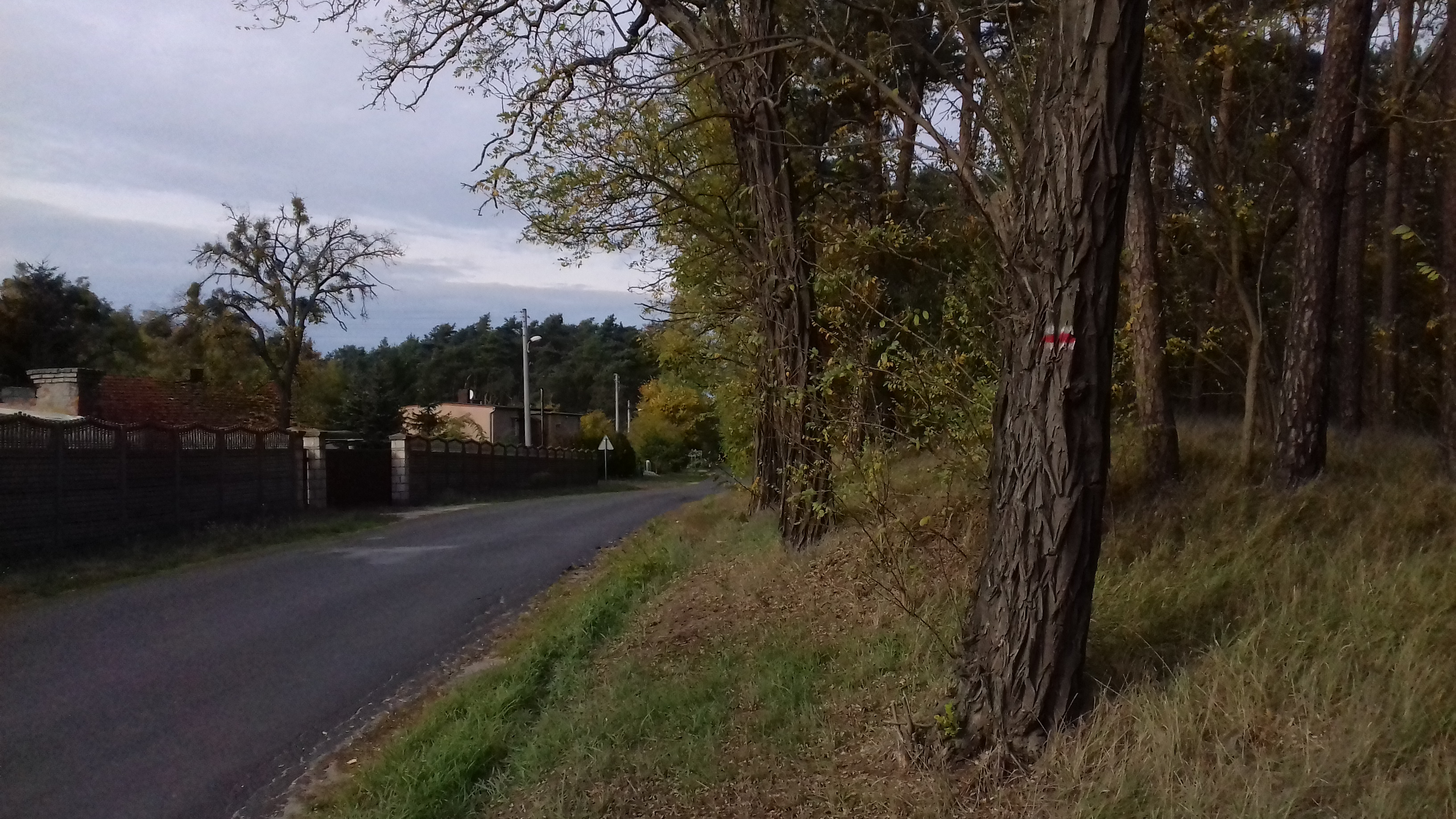 Majdany w powiecie średzkim - oznaczenie szlaku pieszego nr 186 (czerwonego)